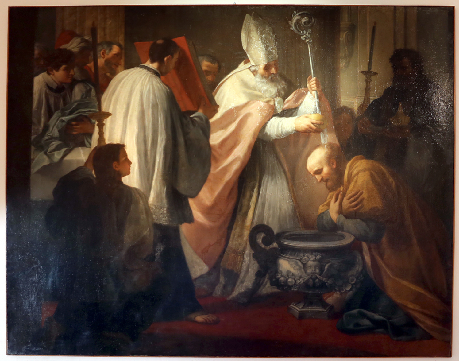 Museo del Colle del Duomo (Viterbo) This is a photo of a monument which is part of cultural heritage of Italy.